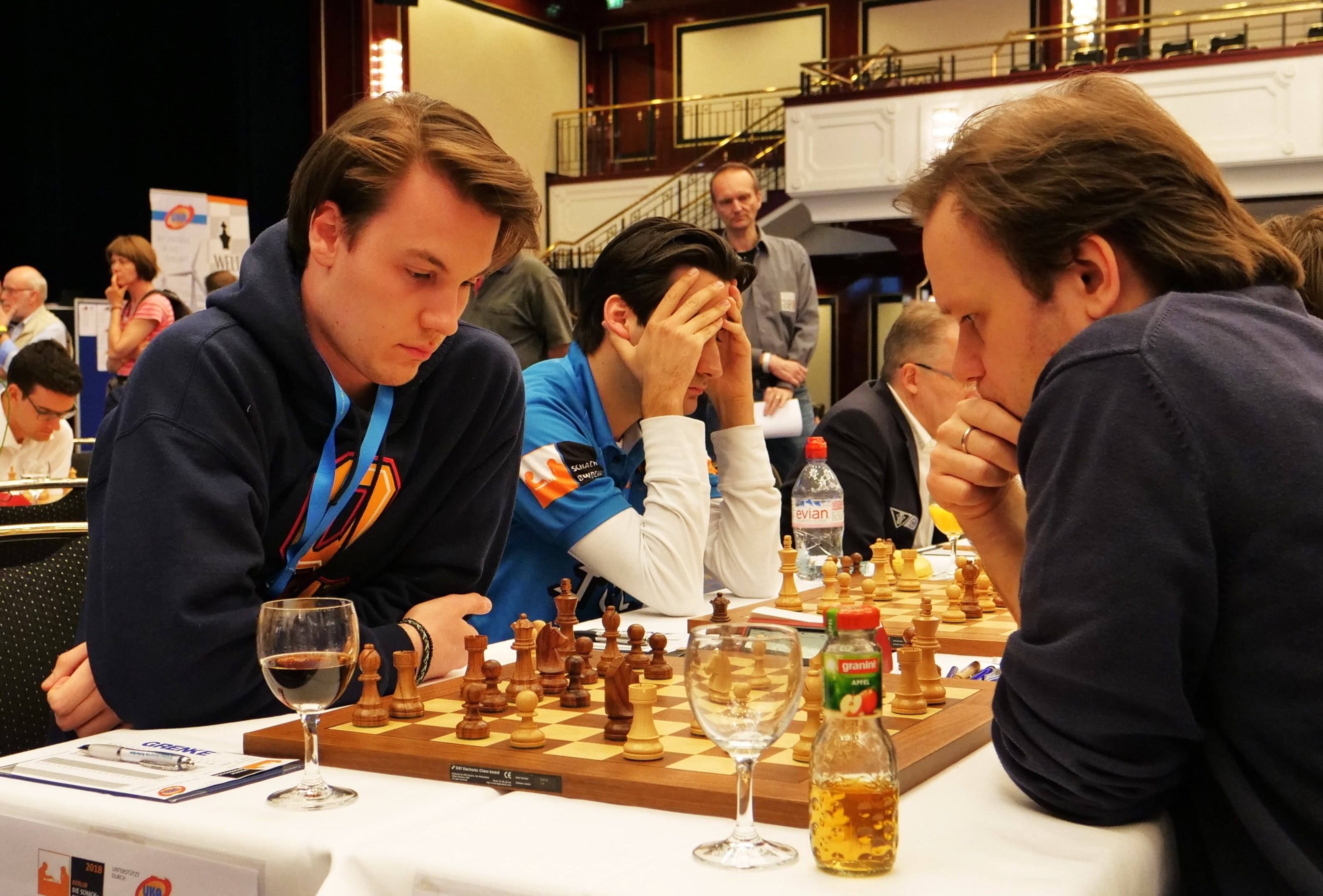 Handke, Bok und Van Kampen - Bundesliga-Endrunde 30-4-2018